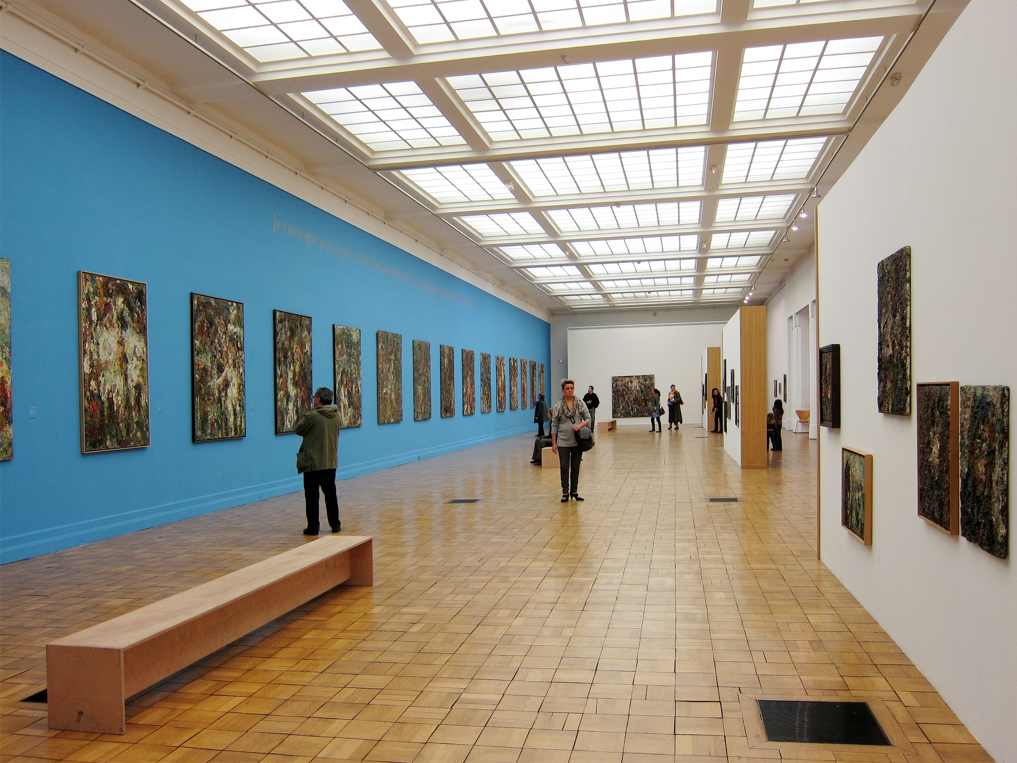 Une salle du MUba Eugène Leroy à Tourcoing (Nord), lors de l'exposition du centenaire.